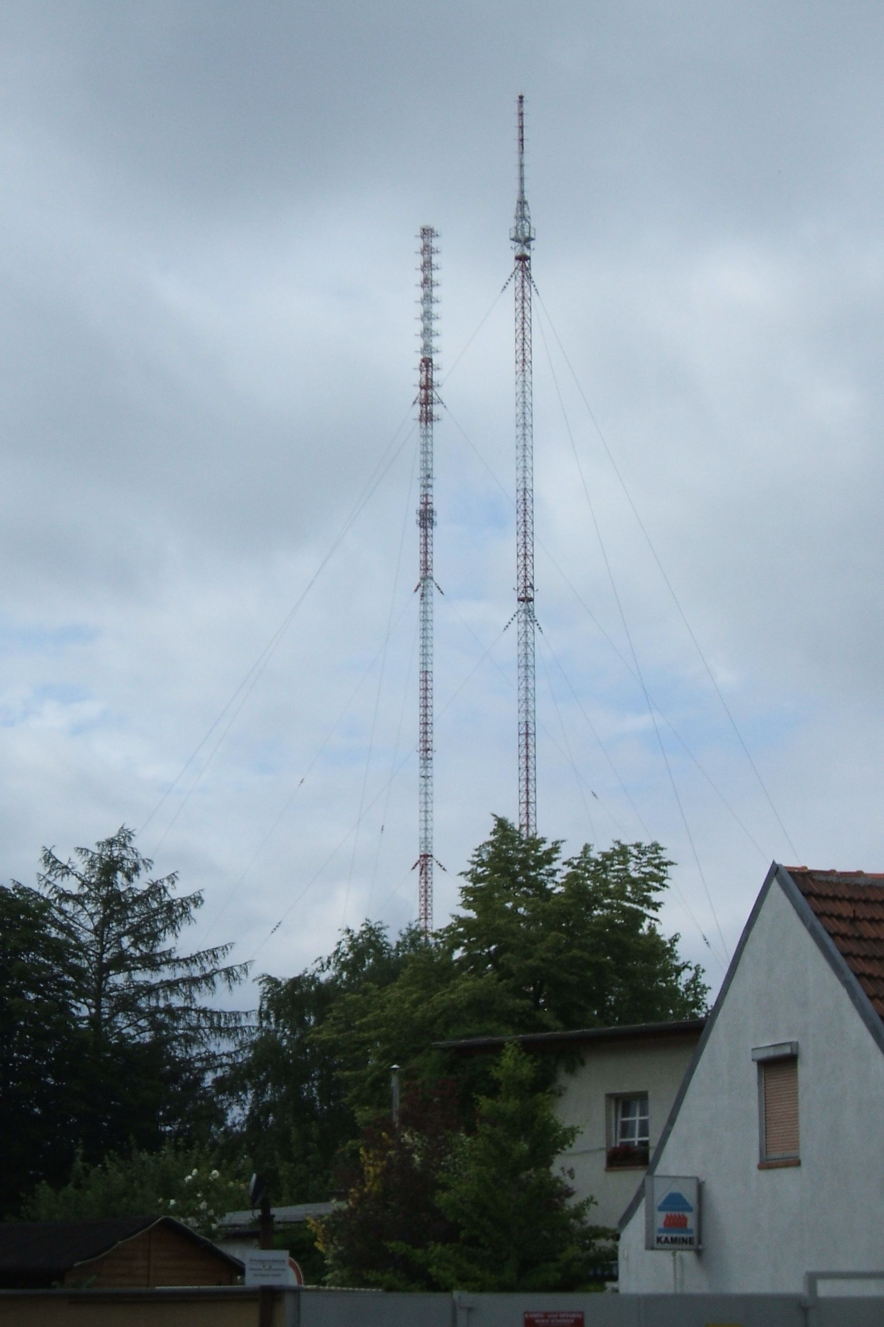 Berlin Britz, die Sendeanlage des Deutschlandfunks